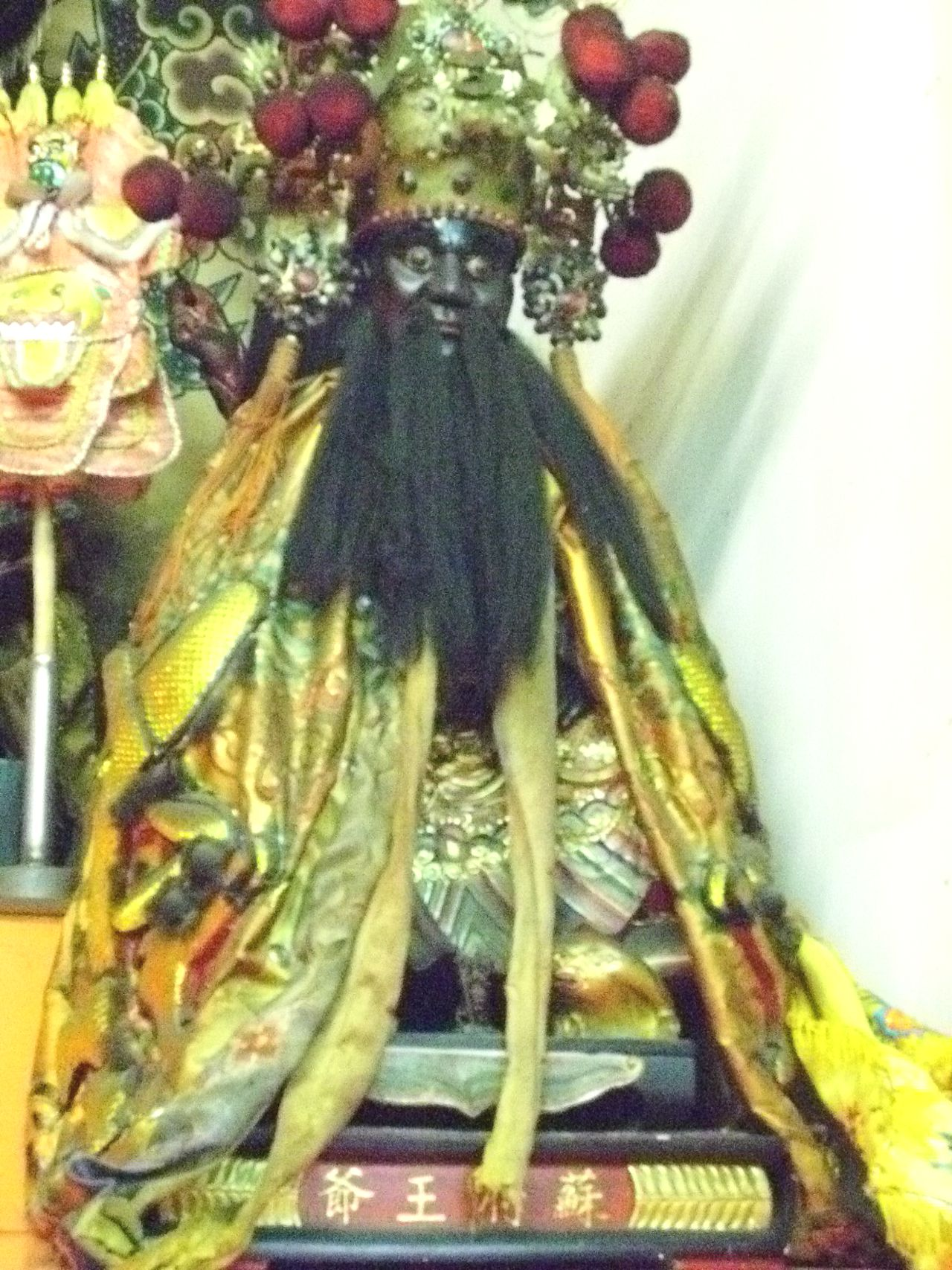 港尾太子宮位在臺中市西屯區港尾里同志巷71號